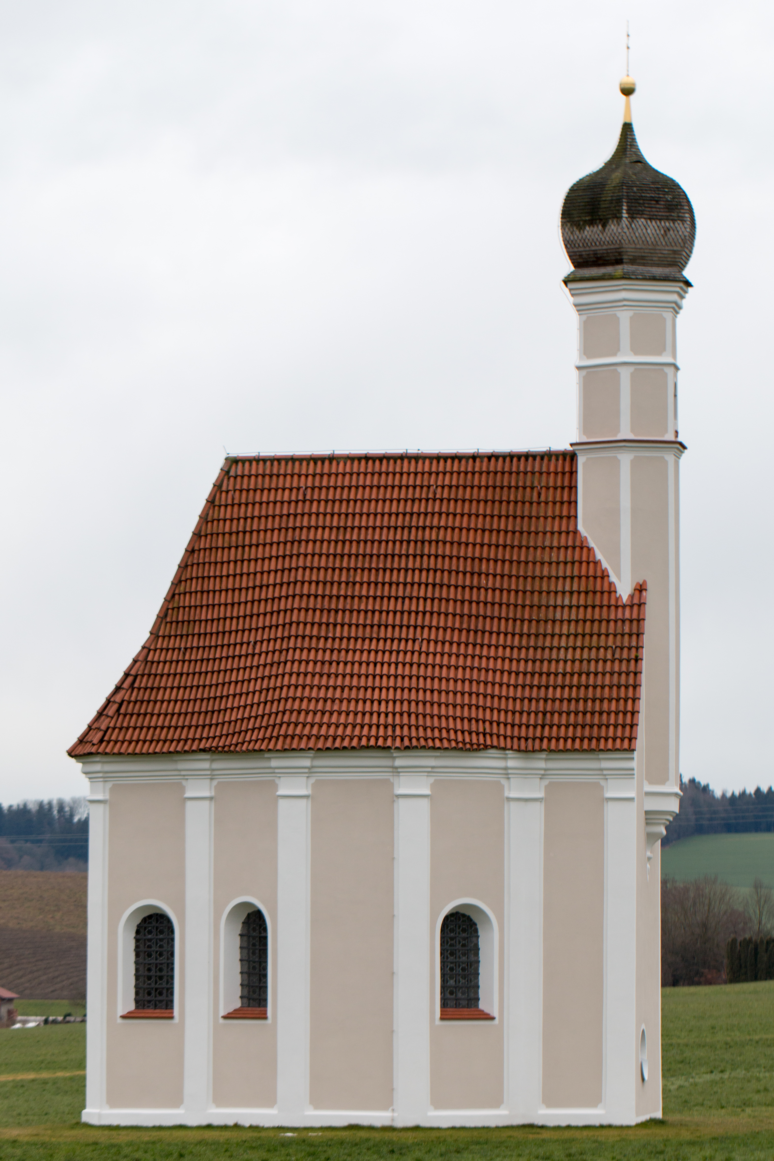 Filialkircherl St. Andreas